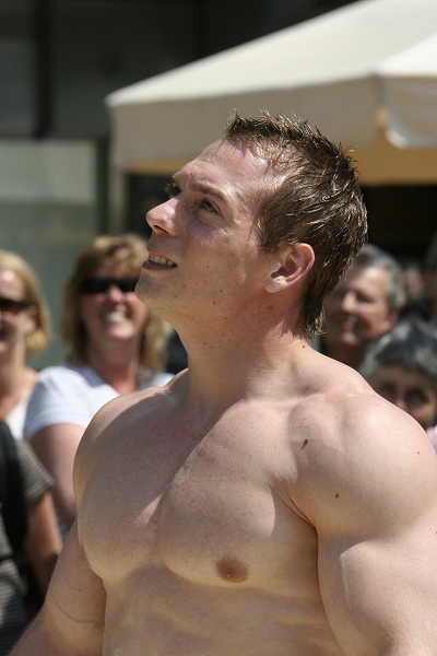 Yuri van Gelder in 2008